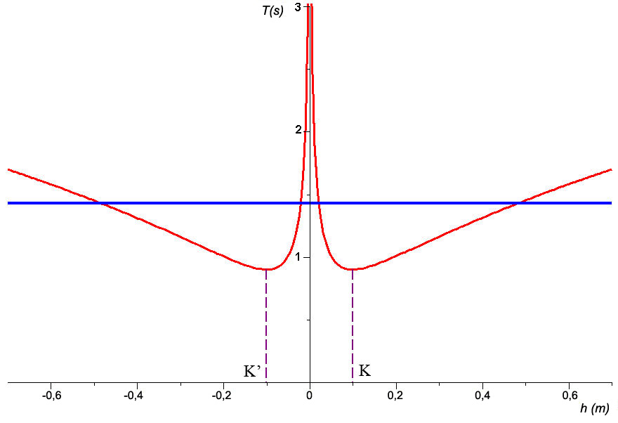 Doble rama por radios.